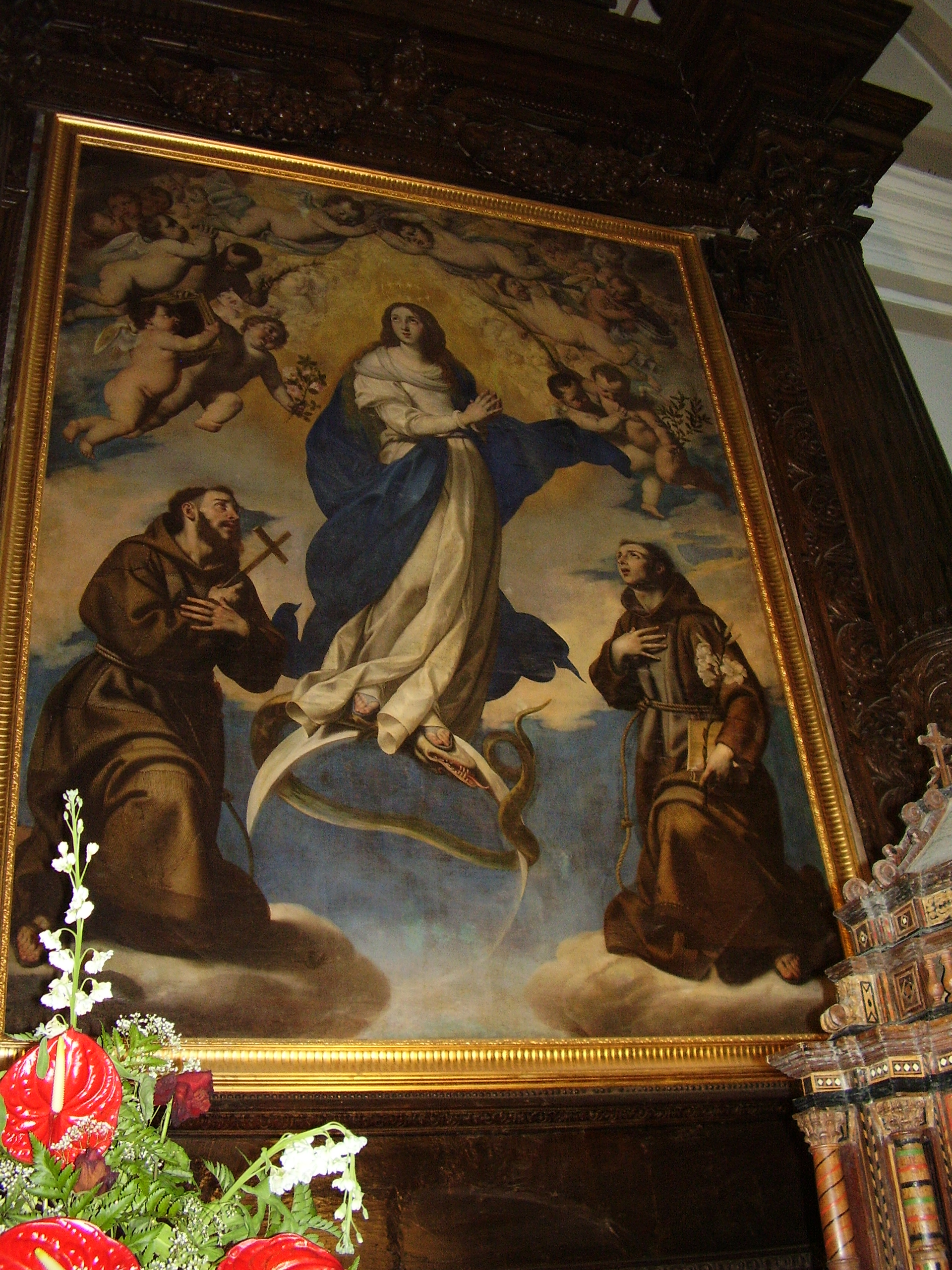 Pacecco De Rosa "Immacolata con San Franceso d'Assisi e Sant'Antonio", chiesa di Sant'Antonio di Padova, Vibo Valentia